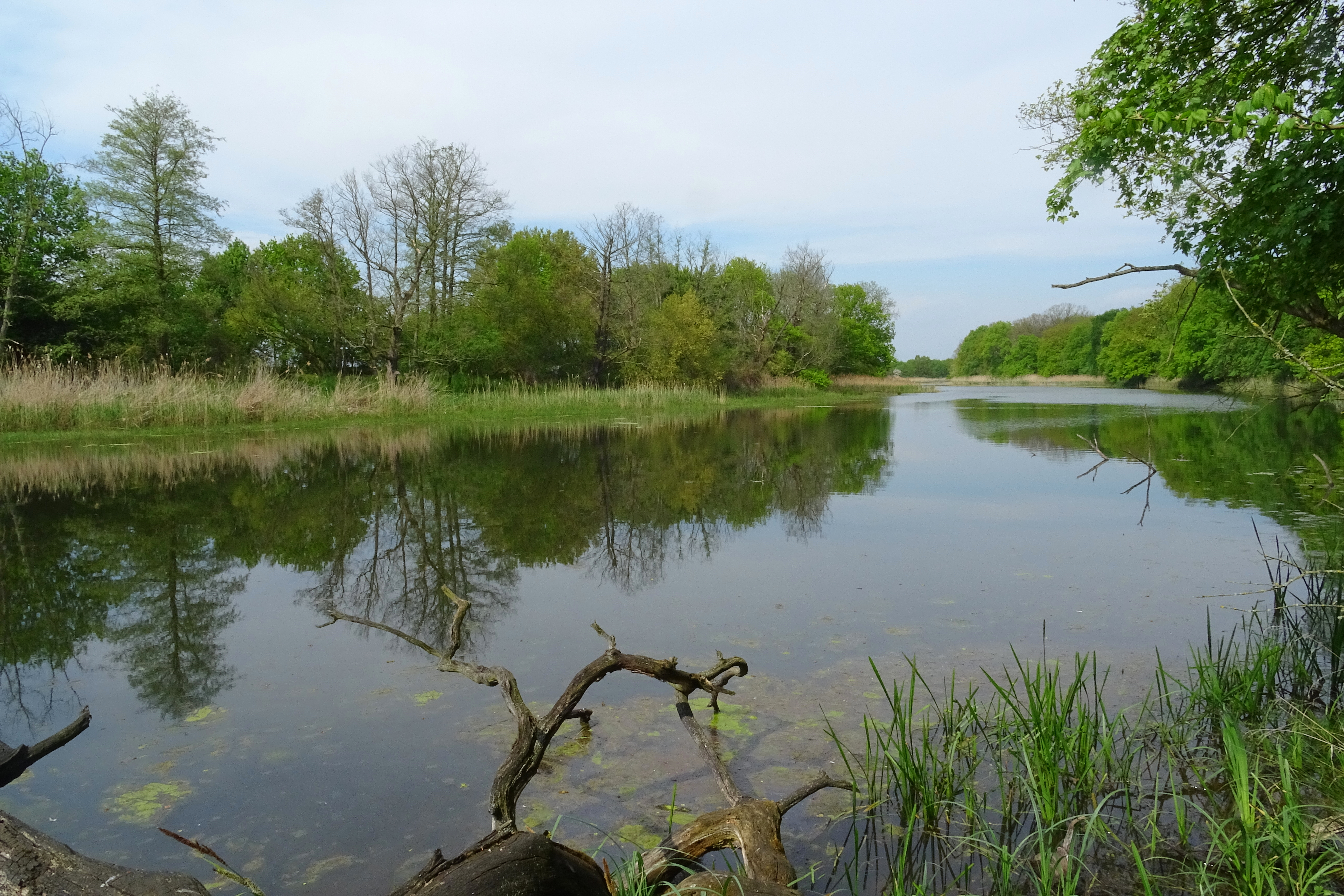 Die Alte Elbe im Frühling, aufgenommen auf einem umgestürzten Baum am Ufer des NSG Kreuzhorst, das sich im Biosphärenreservat Mittelelbe befindet.